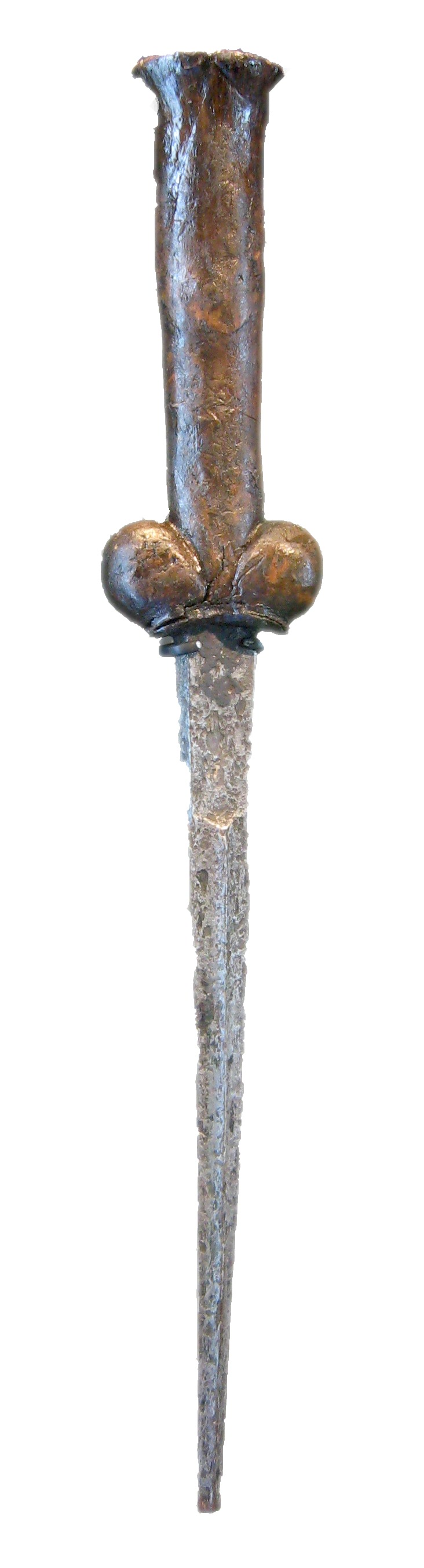 Dolch im Museum Ten Duinen